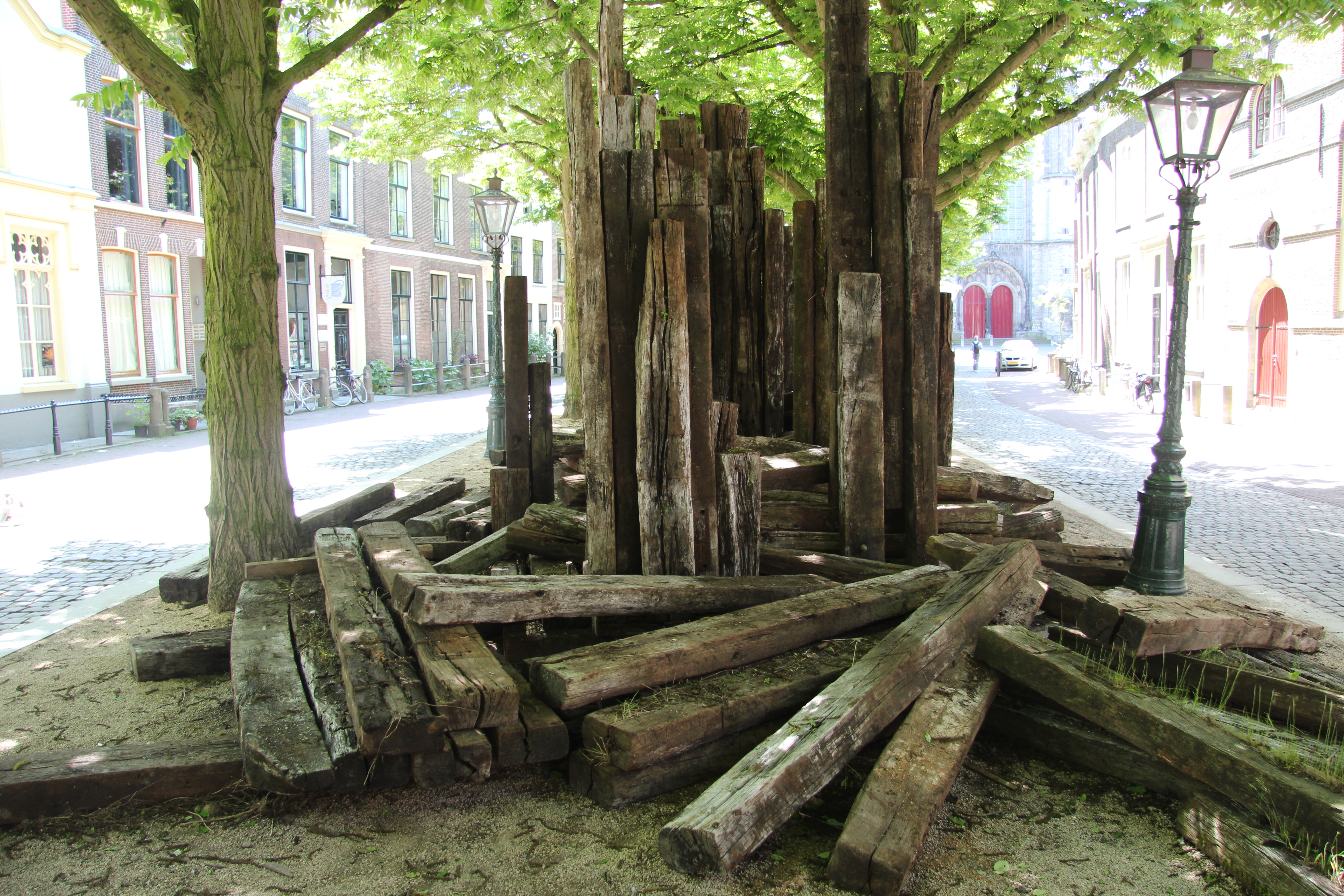 Isaak Zwartjes - Basic construction III. Tentoongesteld op de openluchttentoonstelling 'Beelden in Leiden', Hooglandse Kerkgracht, zomer 2013.